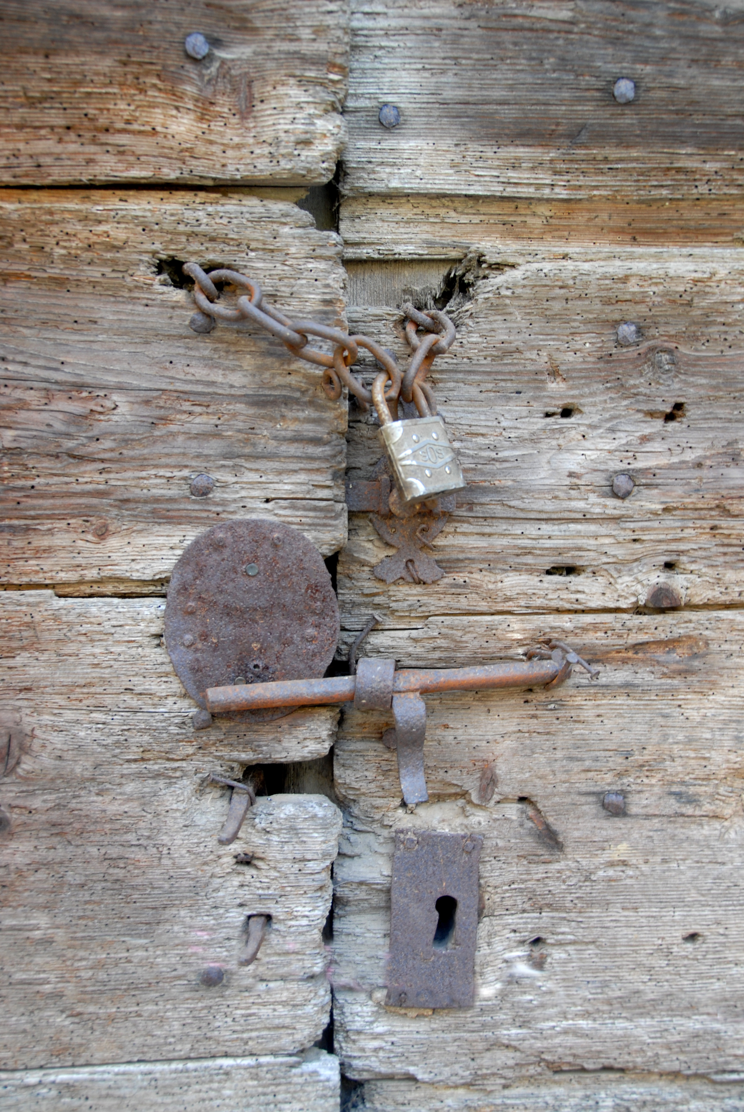 Lavaudieu, alte Eisenbeschläge